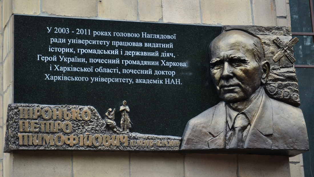 Дошка П. Т. Тронько (НАН)